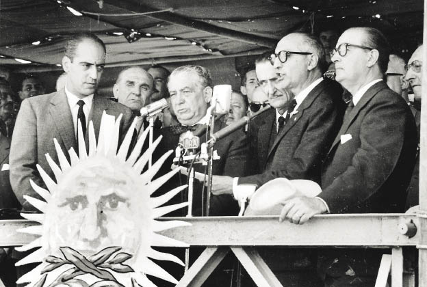 Foto del presidente argentino Arturo Frondizi, en un acto de 25 de mayo de 1960, junto al uruguayo Eduardo Víctor Haedo, presidente del Consejo Nacional de Gobierno.